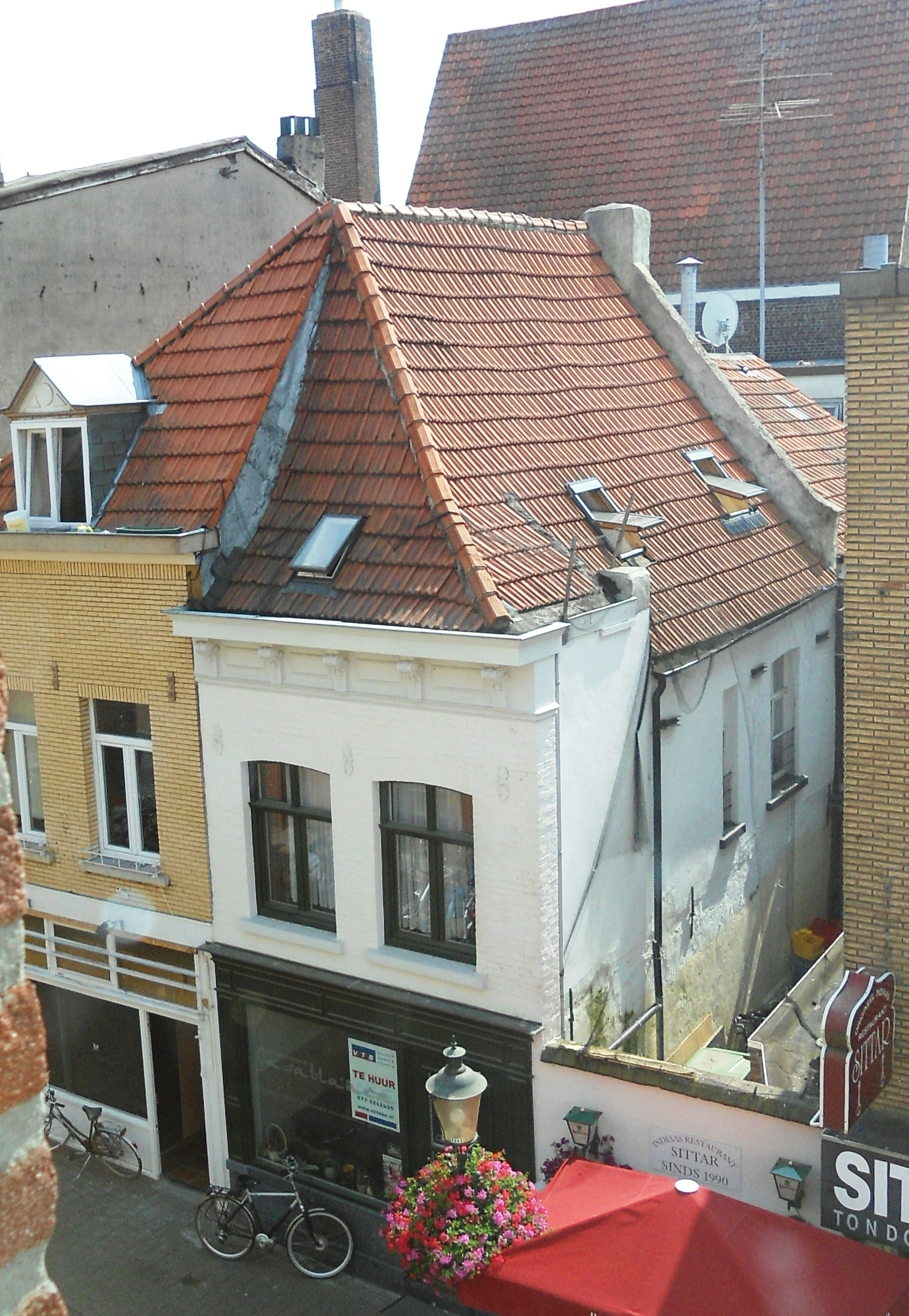 Zicht op enkele panden in de Kleine Kerkstraat